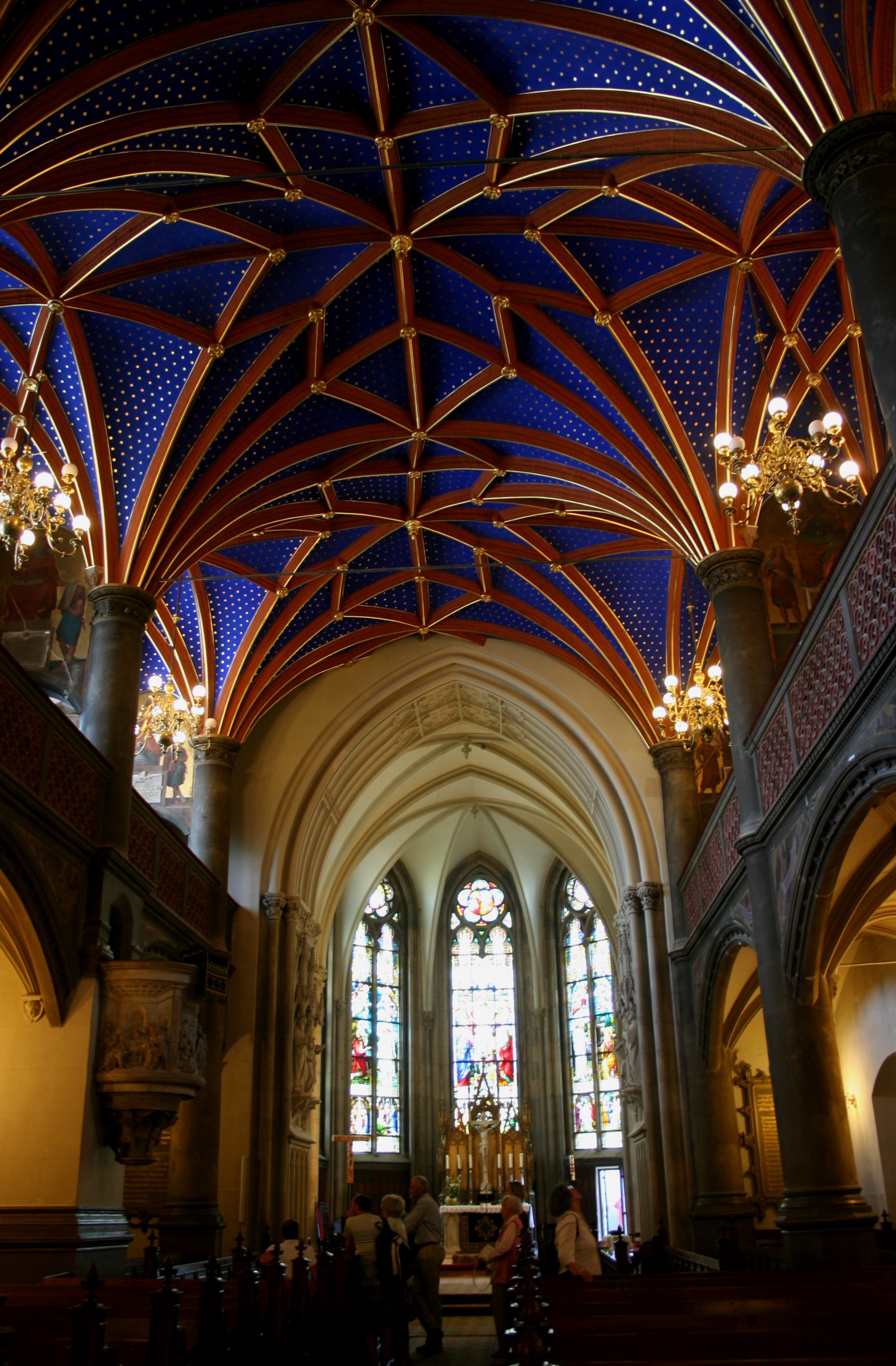 Innenansicht der Schweriner Schlosskirche, Neugstaltung 1848 - 1851, Bauherr: Großherzog Friedrich Franz II., Architekten: Ernst Friedrich Zwirner sowie August Stüler